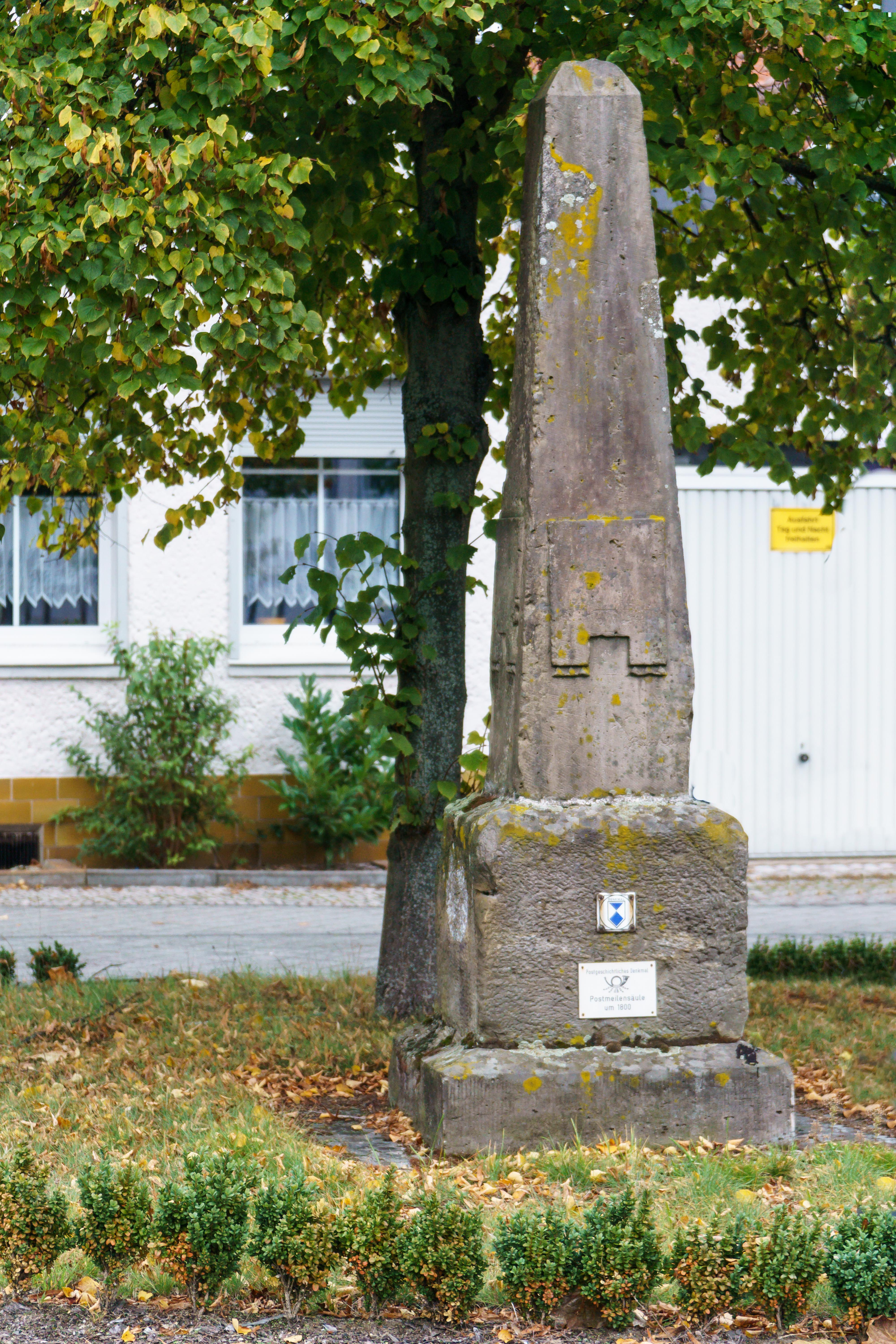 Preußischer Ganzmeilenobelisk (0216) an der L 1, am Kreisverkehr zwischen Töbelmannstraße und Seehäuser Straße in Arendsee.